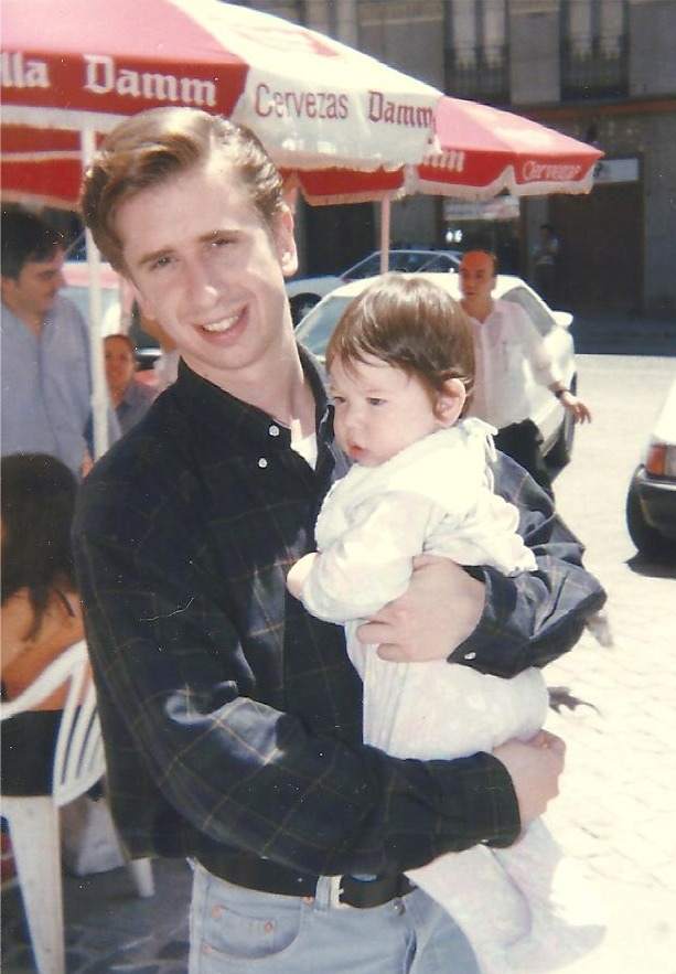 Con Luis Vega en brazos en 1996.